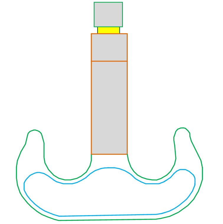 Кованый двурогий грузовой крюк